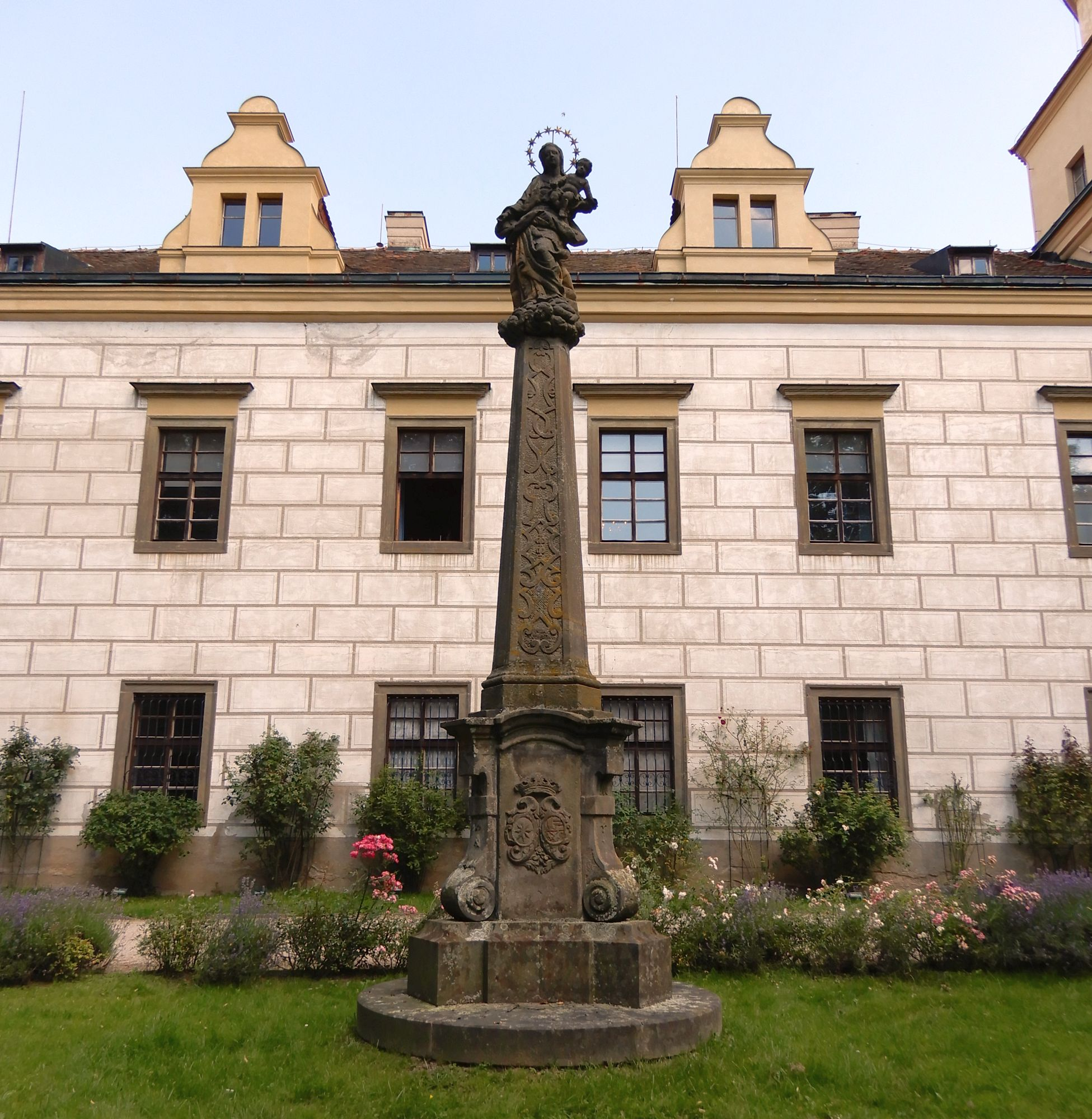 Častolovice, barokní statue Panny Marie před zámkem